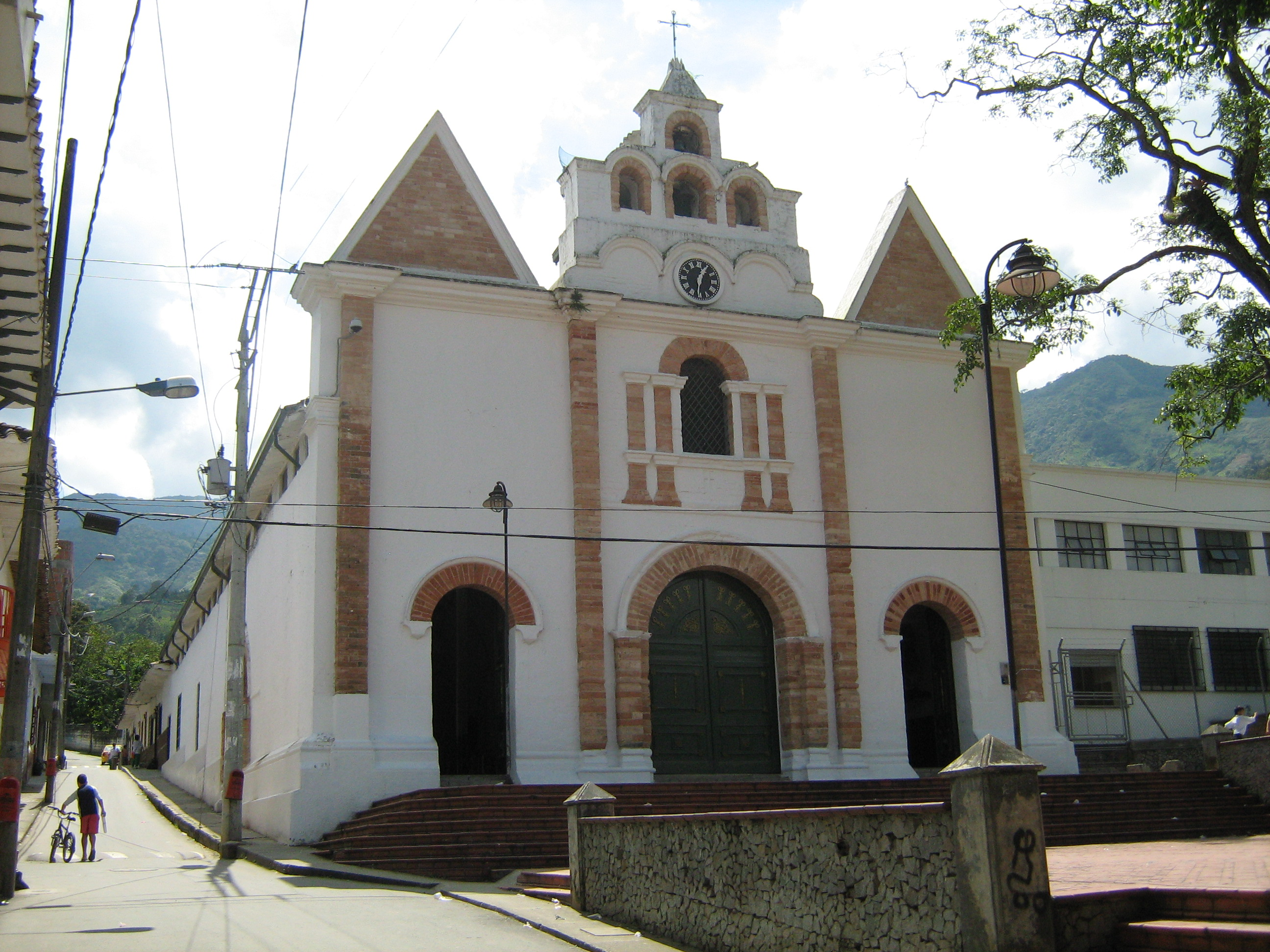 Capilla de María Auxiliadora en el municipio de Barbosa, Antioquia, Colombia.